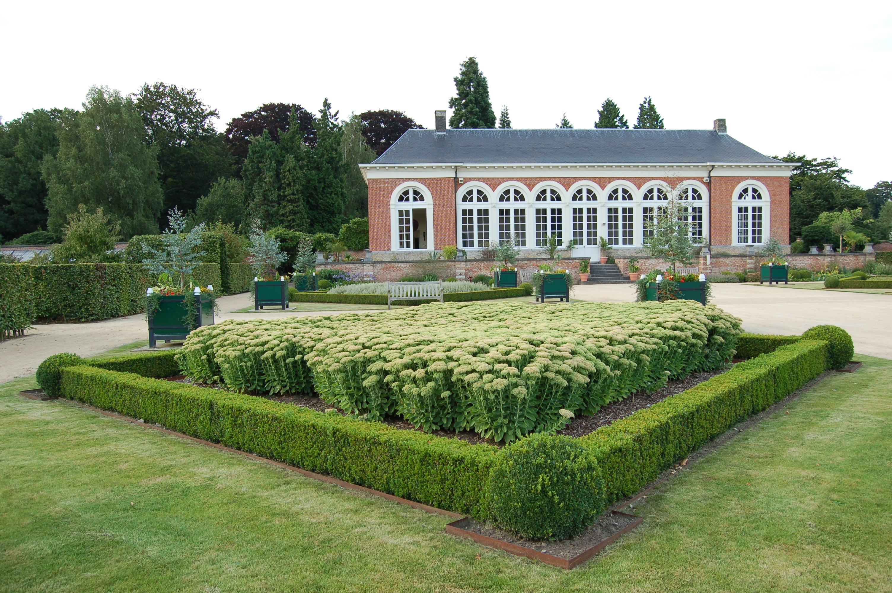 Vordenstein,Oranjerie in laat-classicistische stijl, uit XVIII d-XIX A (?) gelegen in ommuurde moestuin.